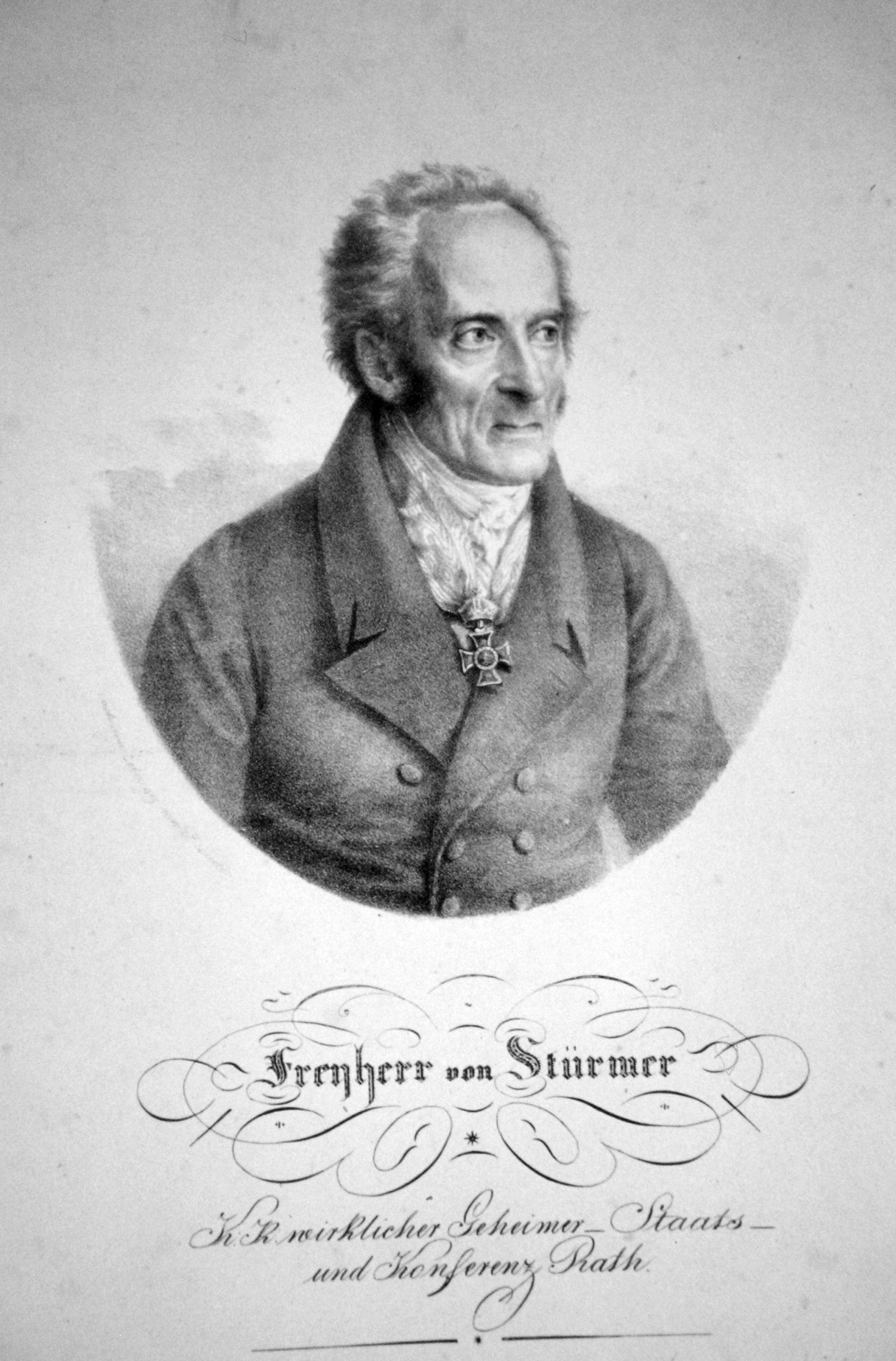 Ignaz Lorenz Freiherr von Stürmer (1752-1828), österreichischer Diplomat. Lithographie von Friedrich Lieder, um 1825.